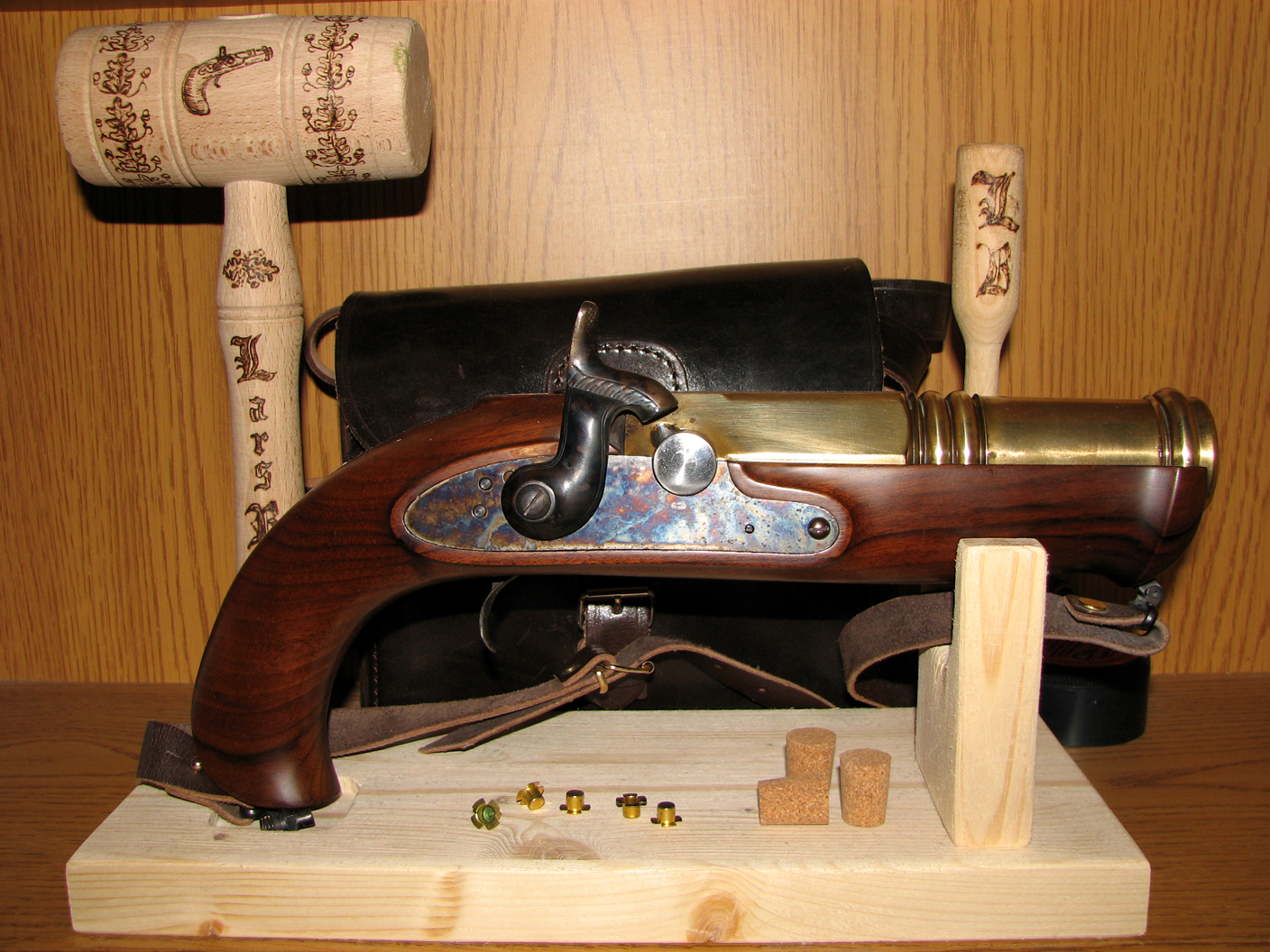 15mm Handböller "Königssee". Darunter drei Korken (Vorlage) und Anzündhütchen, dahinter Ladehammer und Ladestock